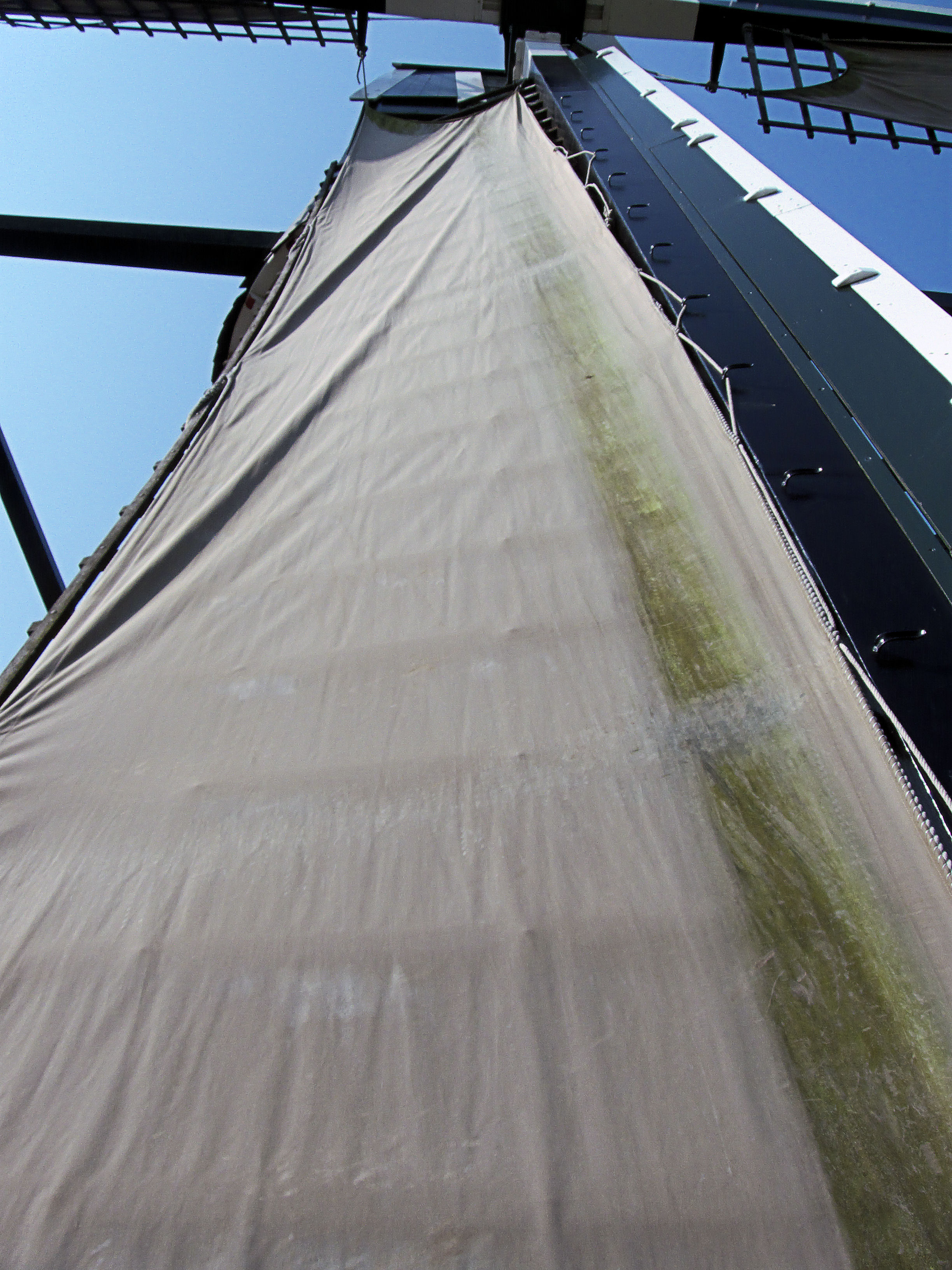 Molen Oog in 't Zeil Cothen, Nederland: zeil op wiek